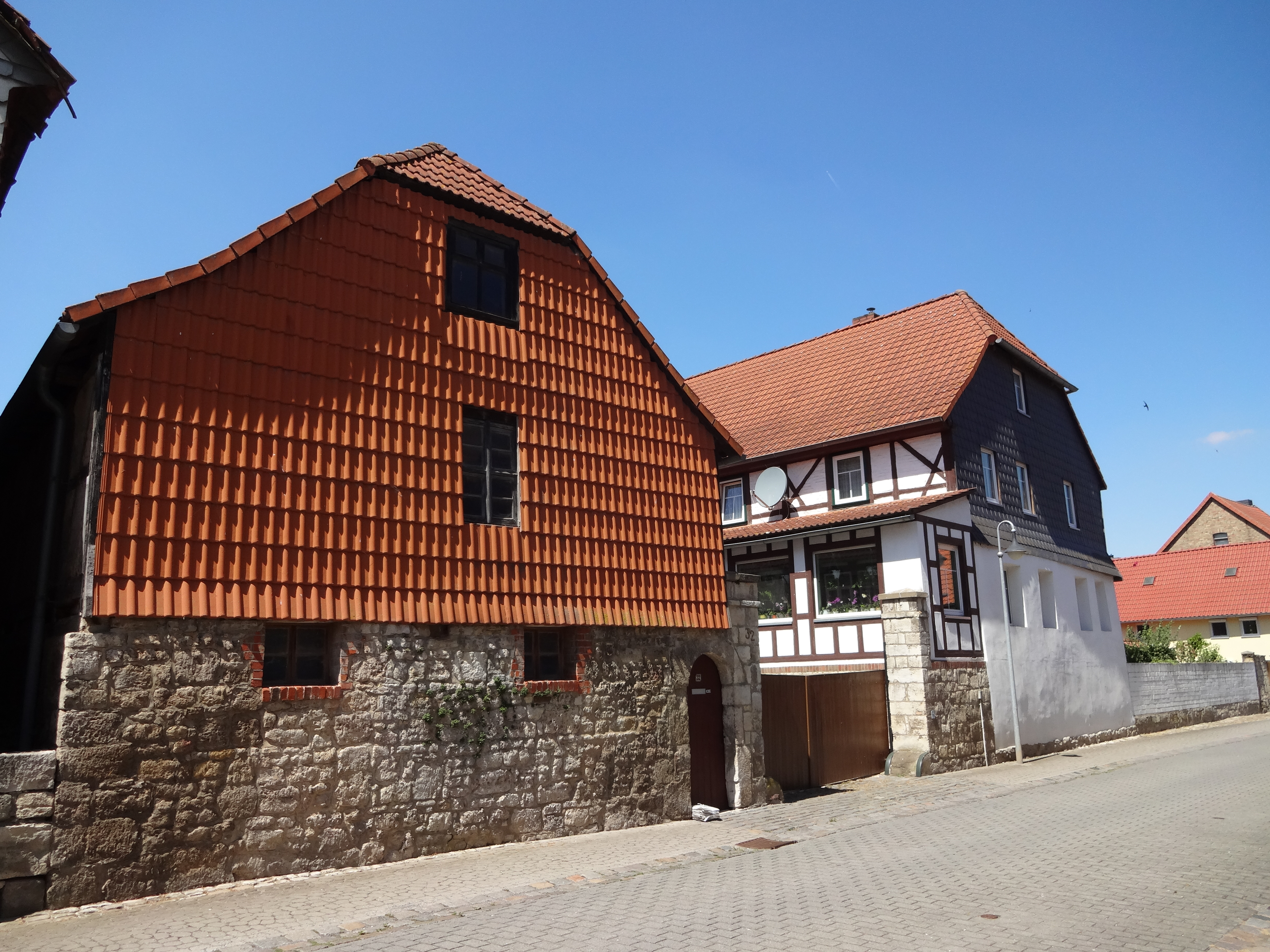 denkmalgeschütztes Bauernhaus in der Hauptstraße 32 in Vogelsdorf (Gemeinde Huy)